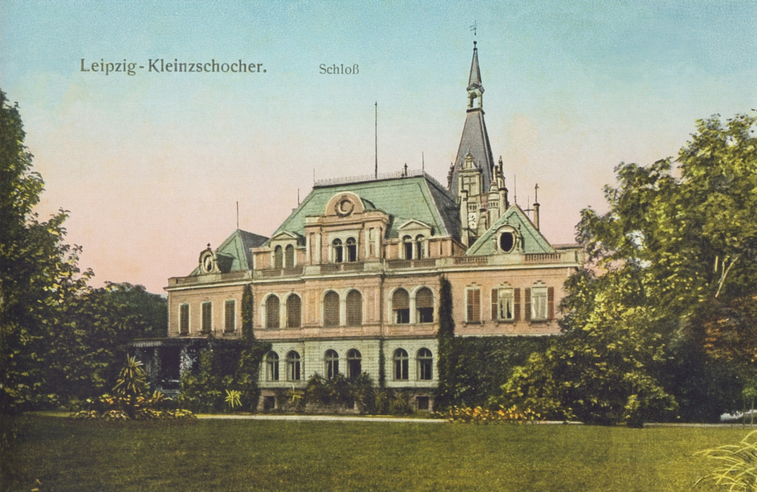 Das Schloss Kleinzschocher von der Parkseite, um 1915